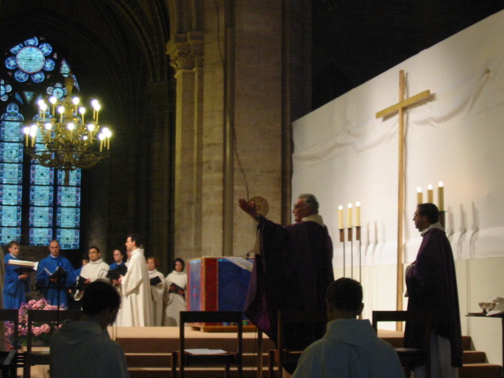 Notre Dame inside